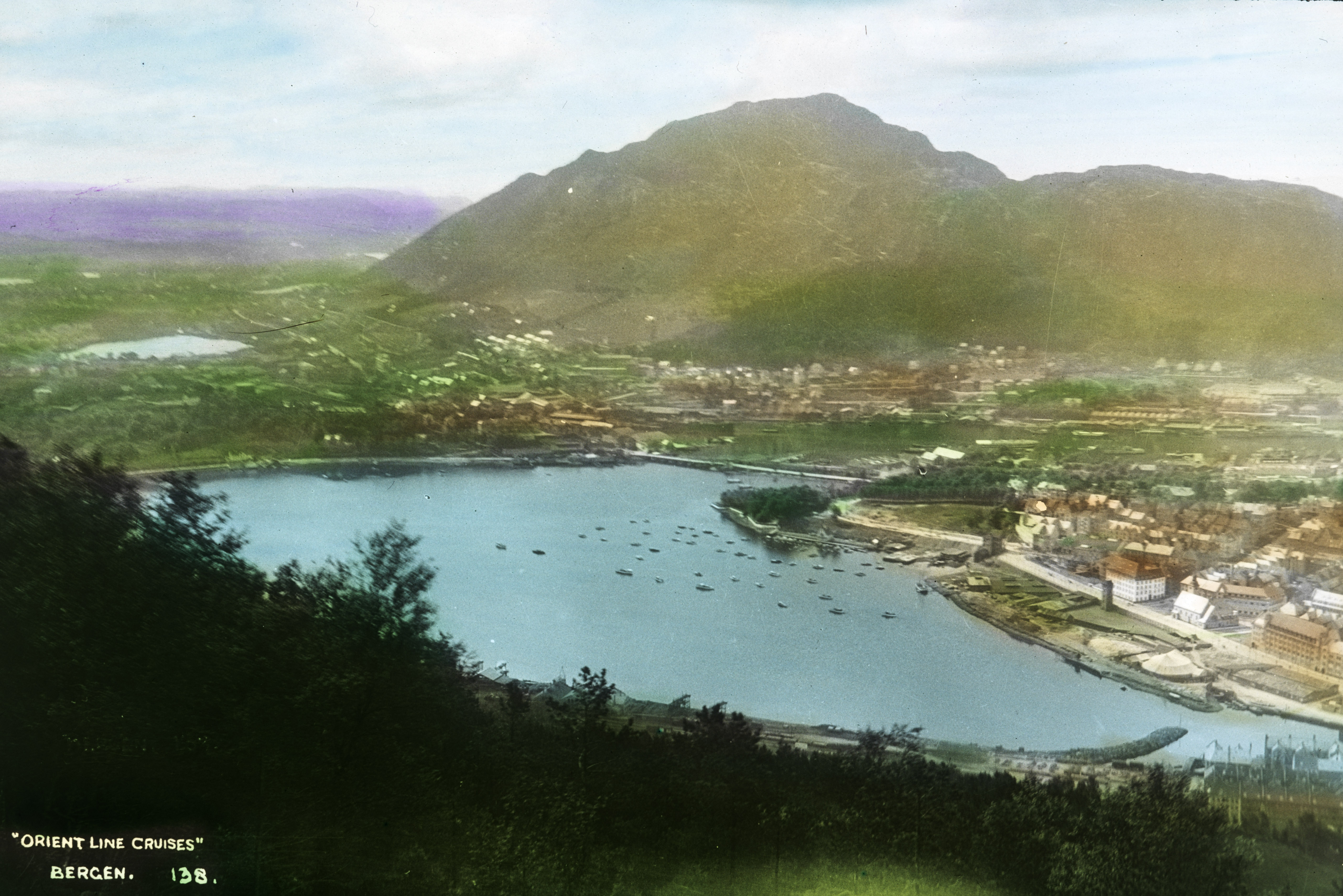 SFFf-1992078.0034 "'Orient Line Cruises' Bergen. 138." The Store Lungeg�rdsvann lake in Bergen.